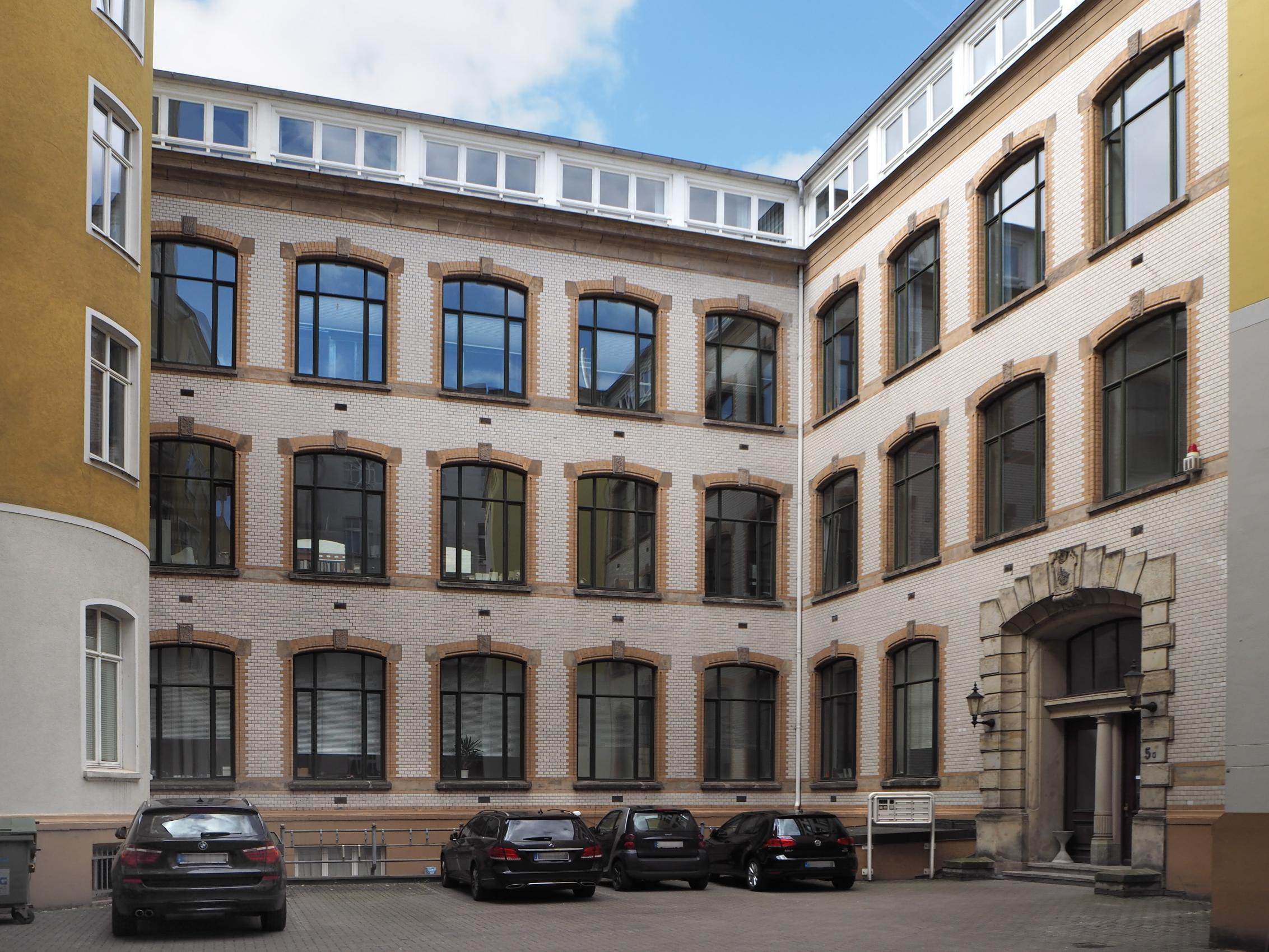 Hamburg-Altstadt, ehem. Nobelshof, Zippelhaus 5, Innenhof, Foto: 2016